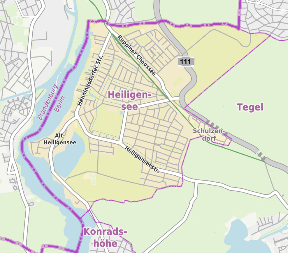 Übersichtskarte der Straßen und Ortslagen in Berlin-Heiligensee